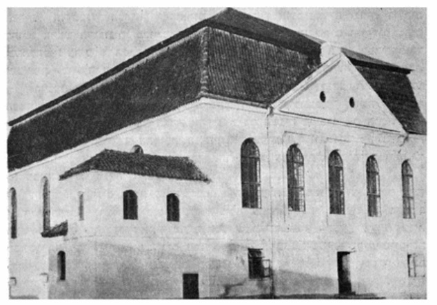 Synagoga znajdowała się w południowo-zachodniej części miasta.